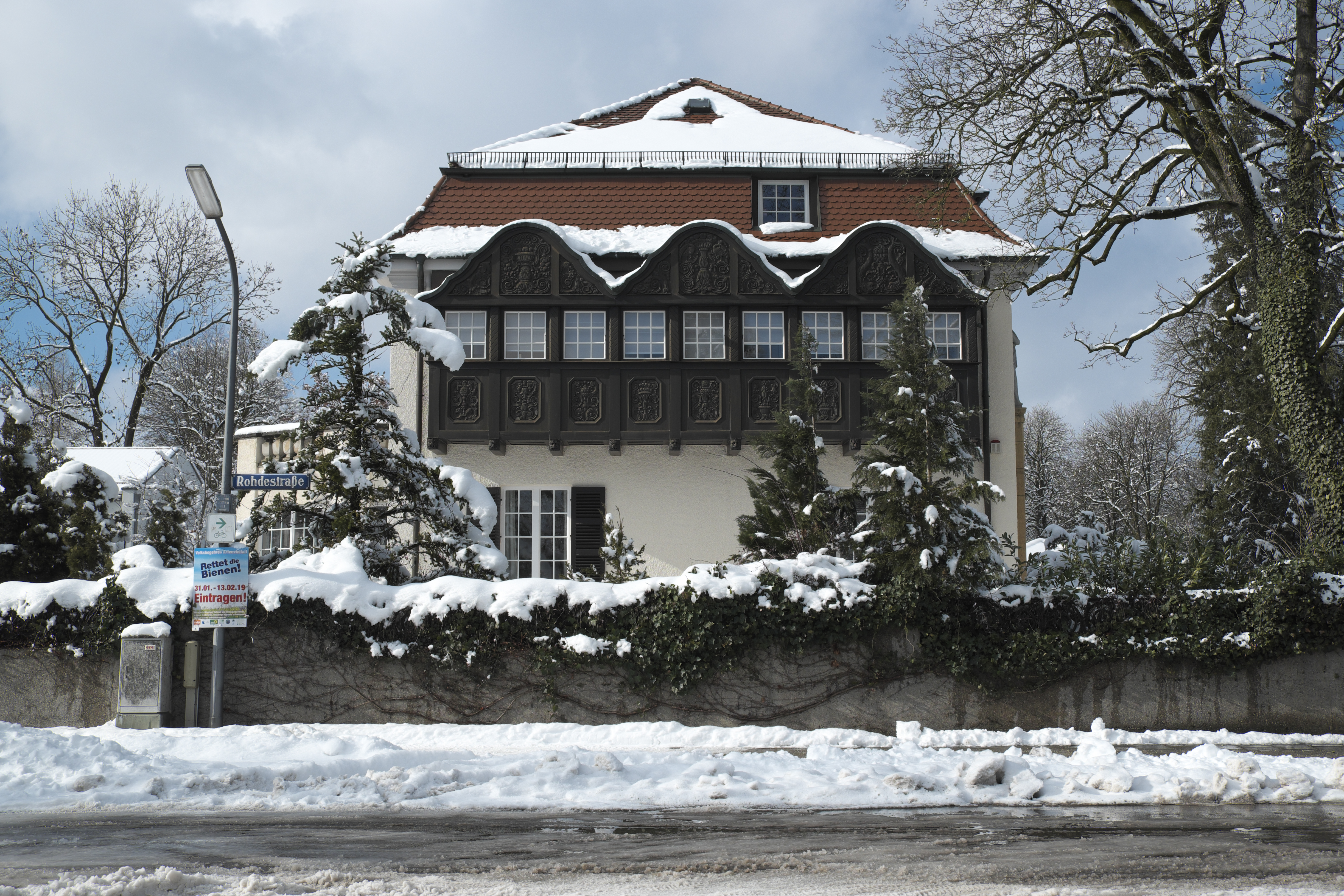 Mansarddachhaus, Marsopstraße 36 (München)/Ecke Rohdestraße, in Obermenzing im Stadtbezirk Pasing-Obermenzing in München (Bayern/Deutschland), 1910 von Bernhard Borst erbaut, Umbau 1927